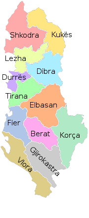 Albánia 2015 utáni megyerendszere